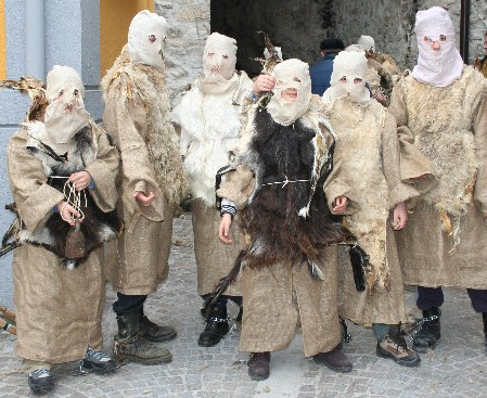 Autore: Fonte: Descrizione: Gli orsi Licenza d'uso: libera Note: nessuna